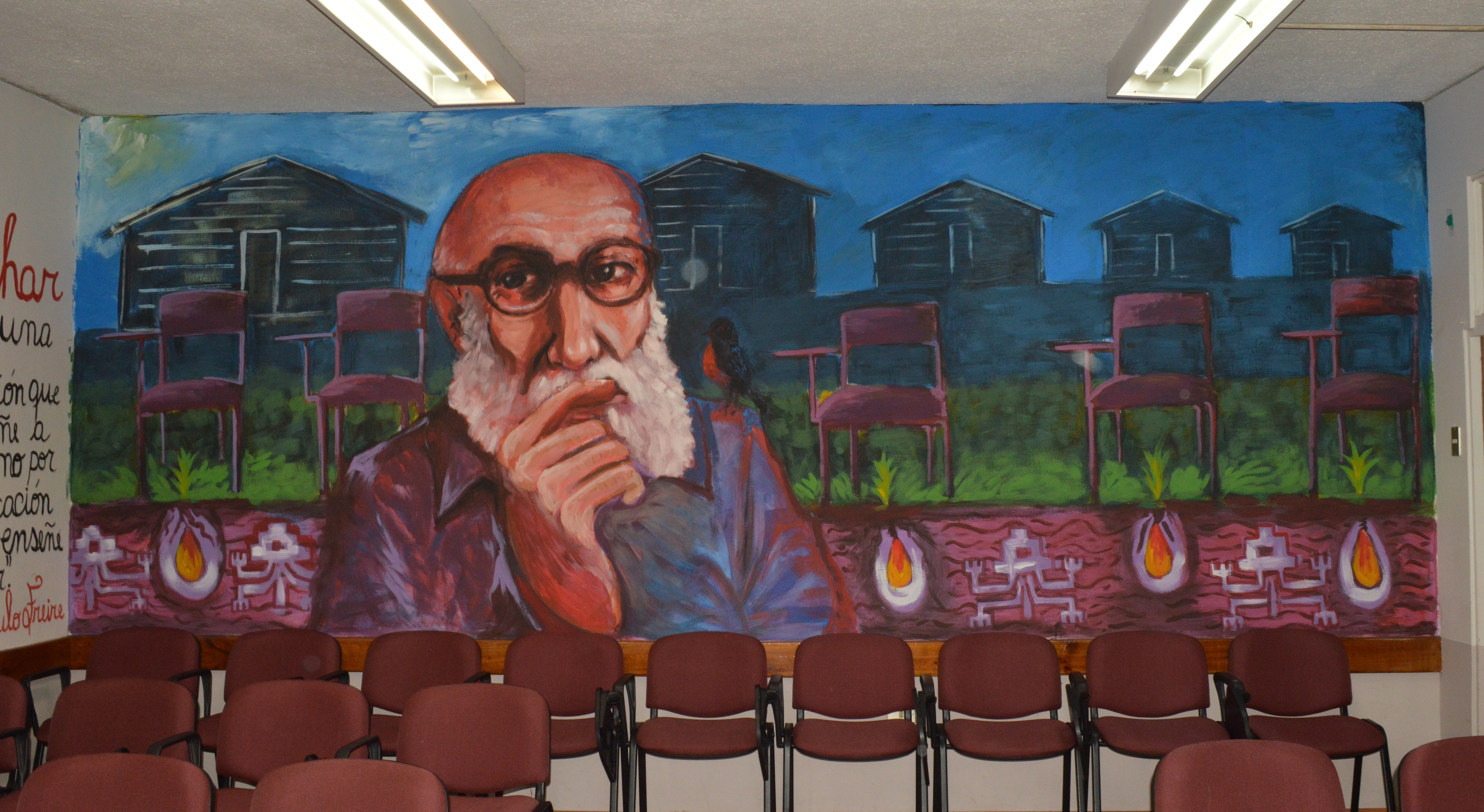 thumb|Julio 2015